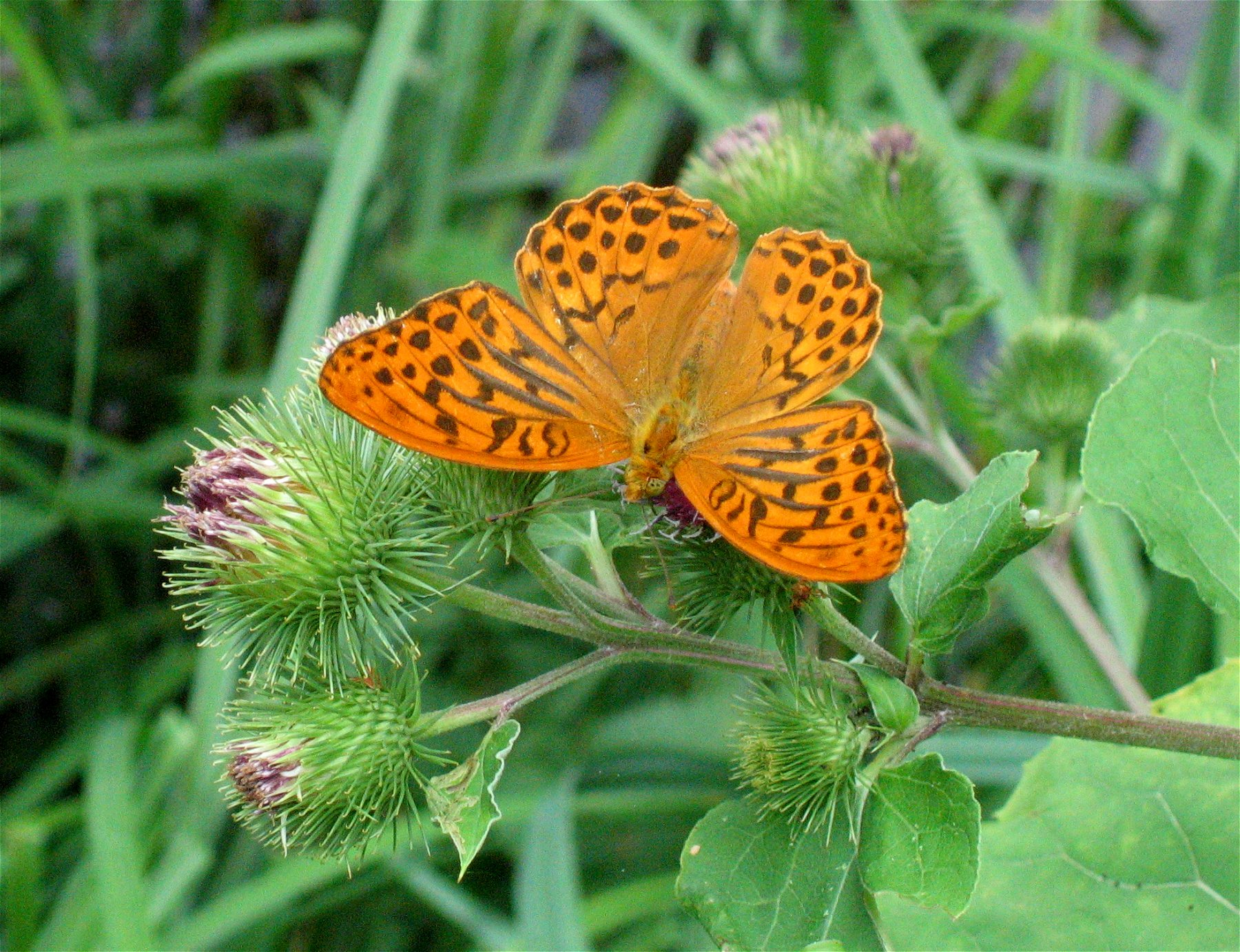 Kaisermantel (Argynnis paphia) am Kugelweiher, Schlosspark Nymphenburg, München